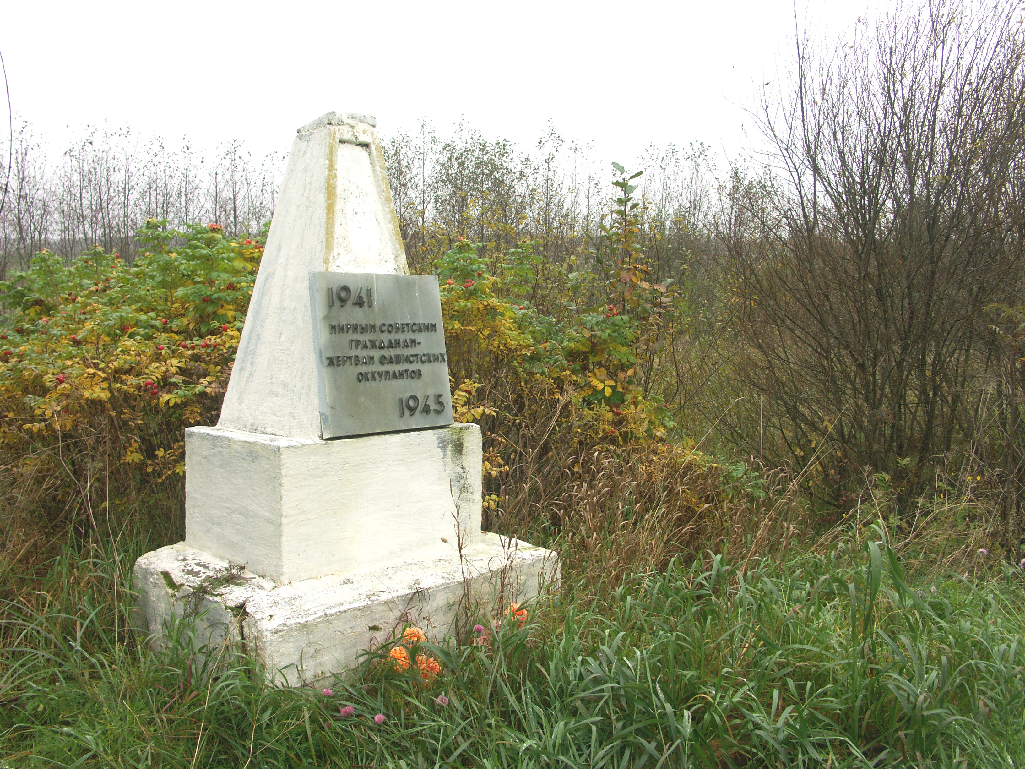 Старый памятник евреям Езерища, убитых нацистами осенью 1941 года. Установлен в 1964 году.